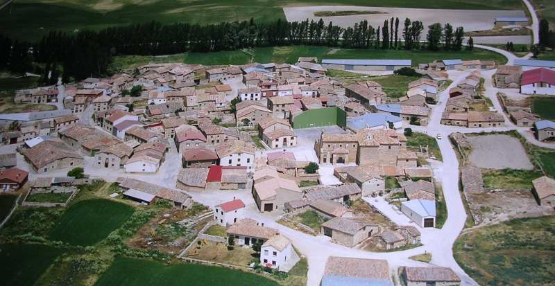 Vista Aerea Taroda